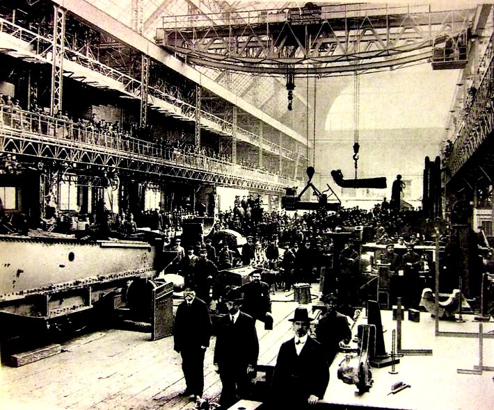 Главное здание Путиловского завода изнутри. Фотография 1900-х годов.